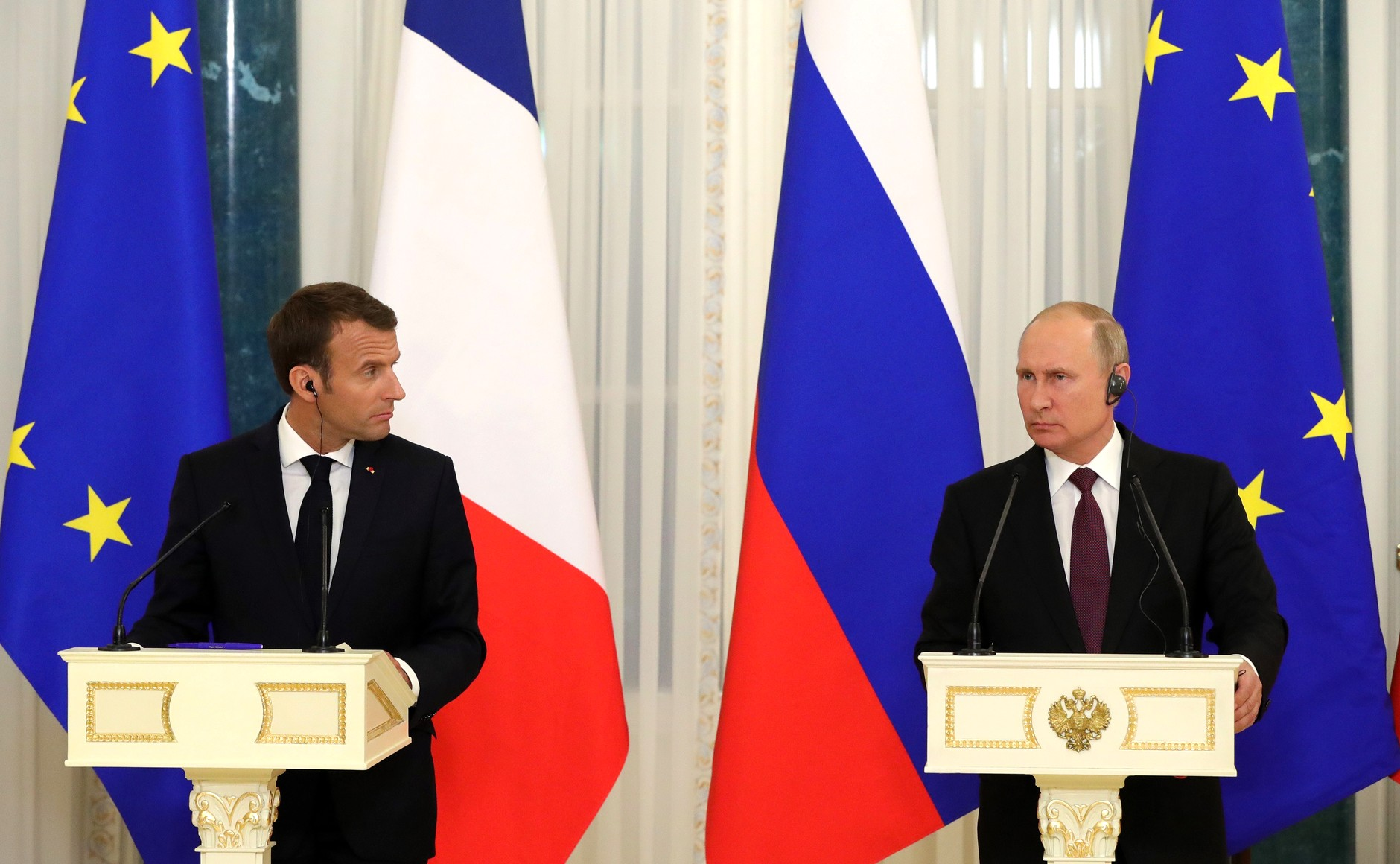 Президент России Владимир Путин с Президентом Франции Эммануэлем Макроном в Санкт-Петербурге 24 мая 2018 года